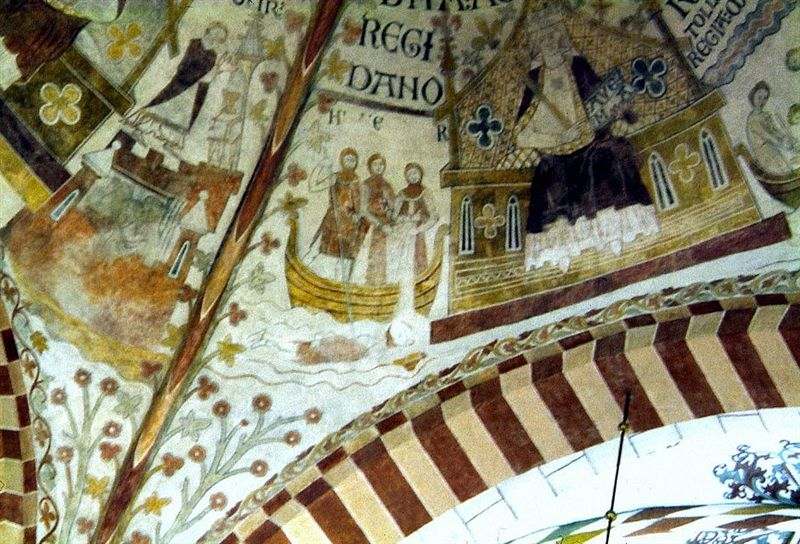 Ringsted Sankt Bendts Kirke i Danmark. Korsskæringens kalkmalerier. Eriks lig sænkes i Slien